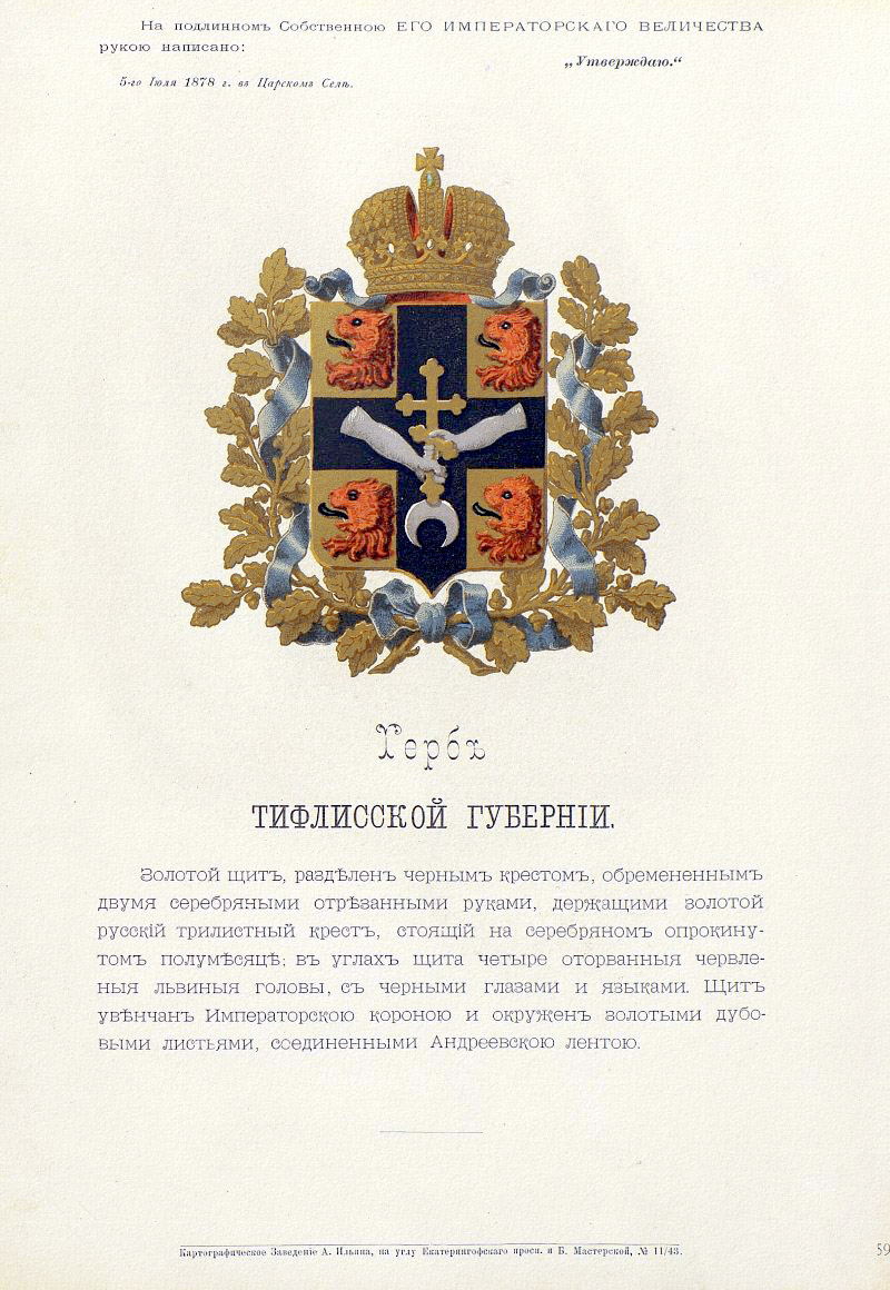 Official Russian Empire coat of arms Tiflis Governorate. Герб Российской Империи Тифлисской губернии с официальным описанием в Гербовнике Бенке. Утверждён Императором Всероссийским Александром Вторым.